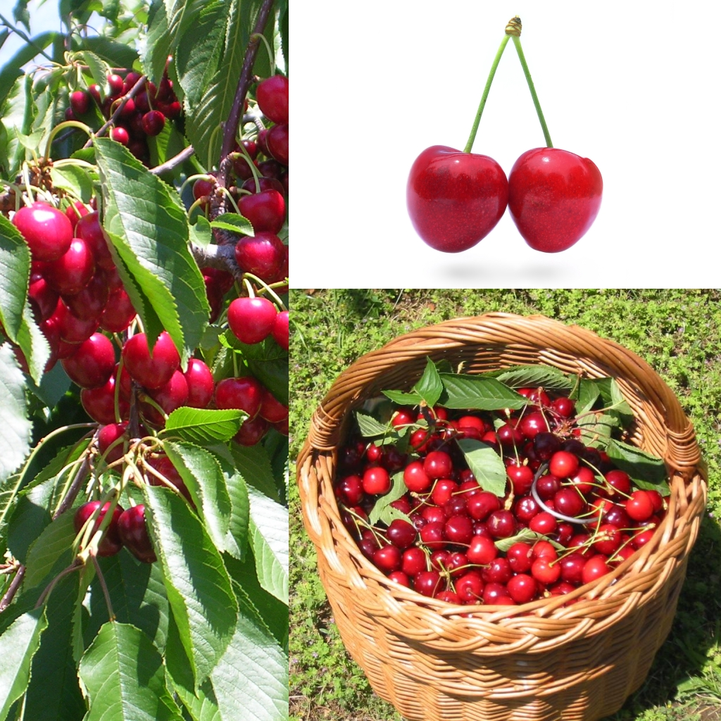 Grafika podręcznika Wikijunior:Owoce. Czereśnia (Prunus avium).